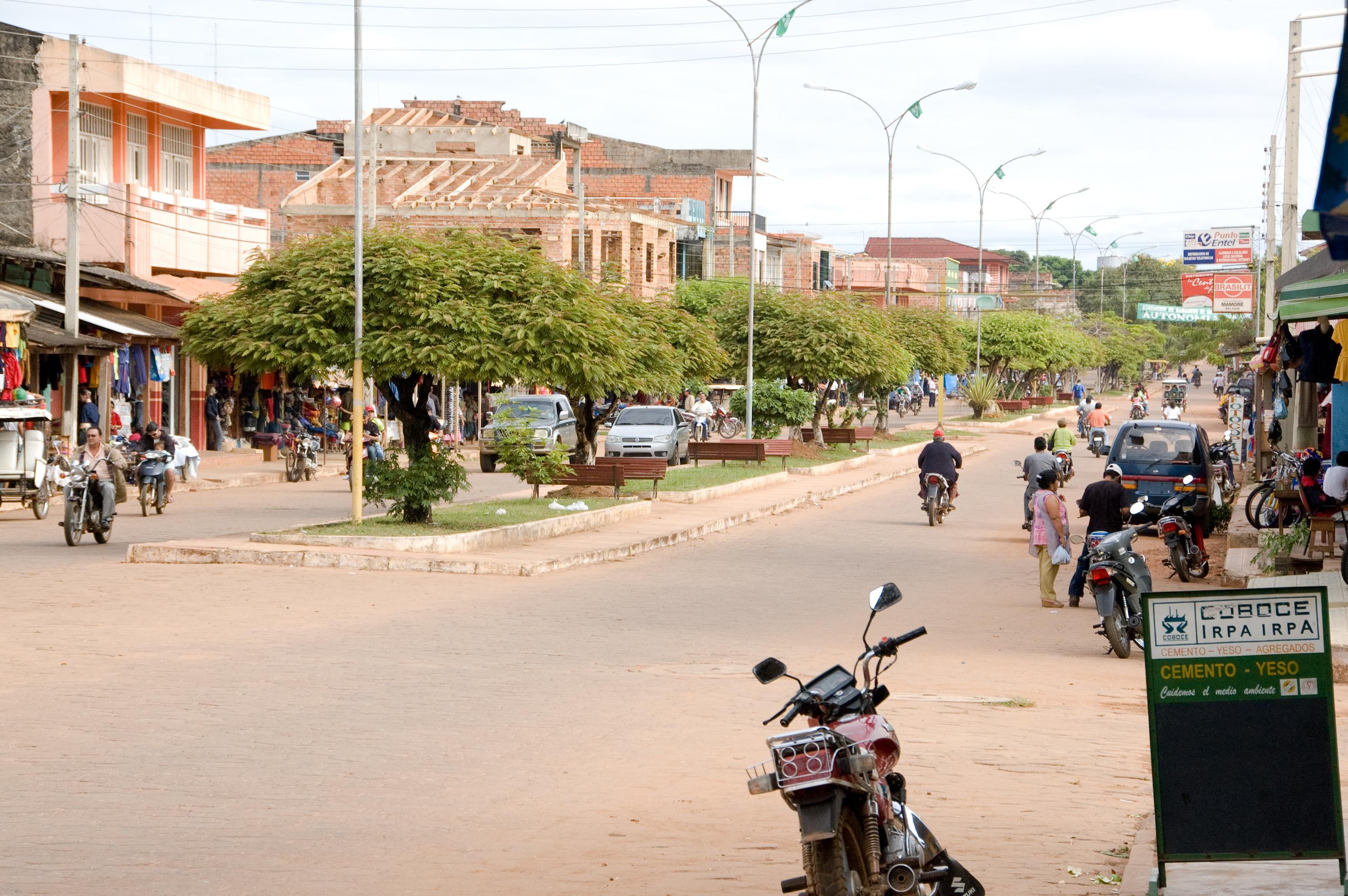 Strassenszene Guayaramerín, Beni, Bolivien